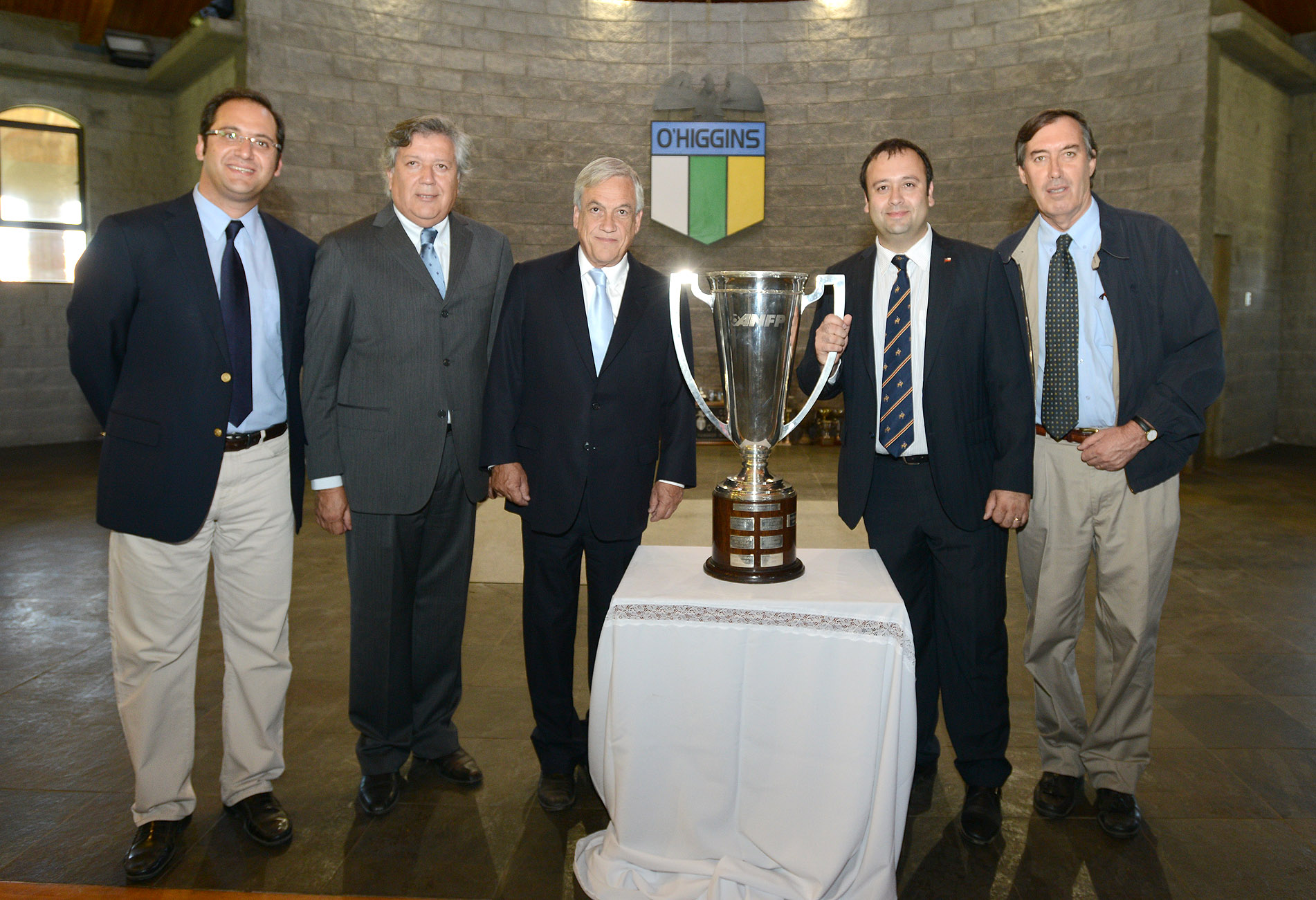 13-12-2013 Visita al plantel del Club Deportivo O"Higgins de Rancagua